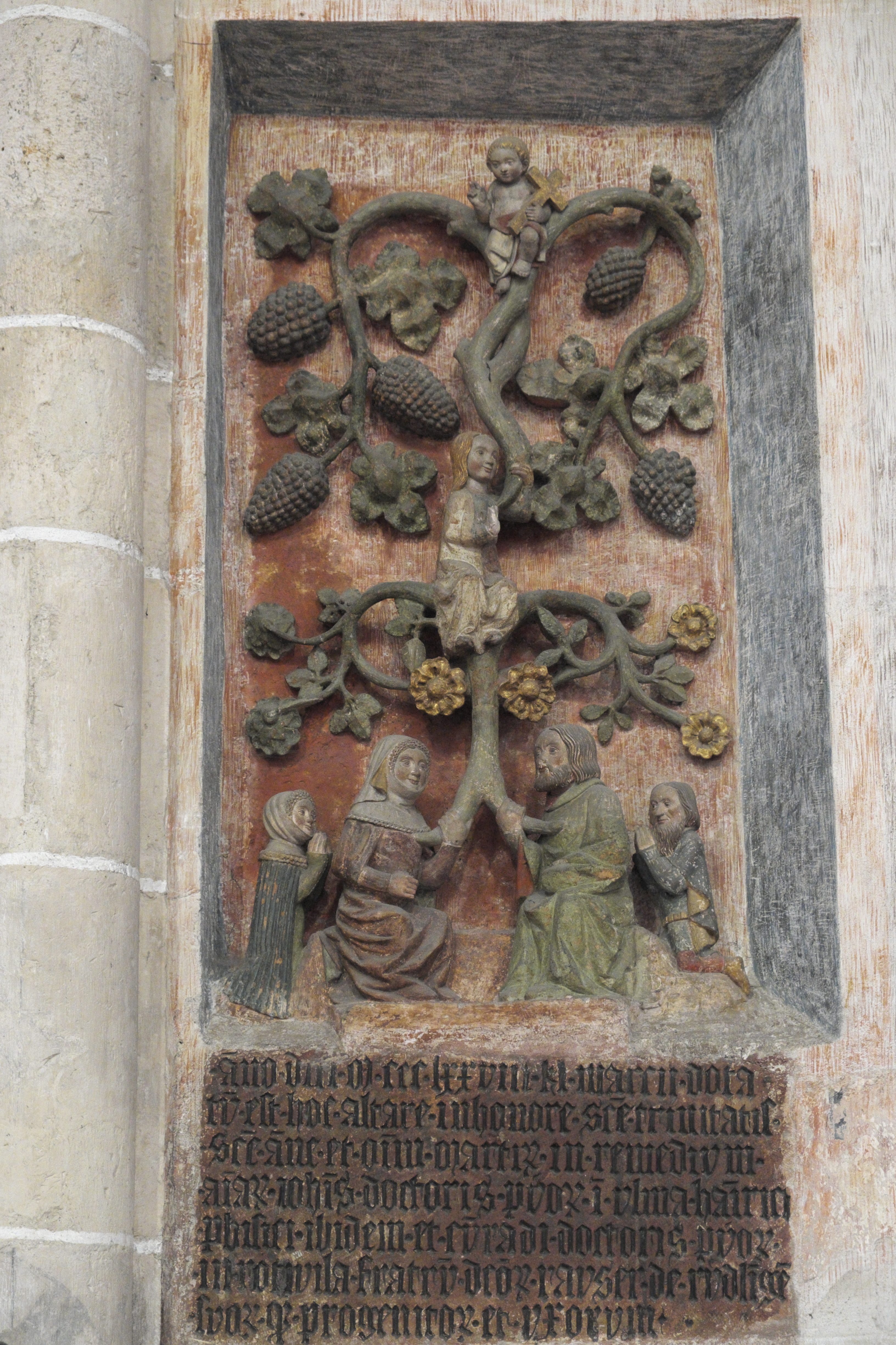 Relief im Münster in Ulm (Baden-Württemberg/Deutschland). Textbeginn: "Anno domini 1377 ?? martii"